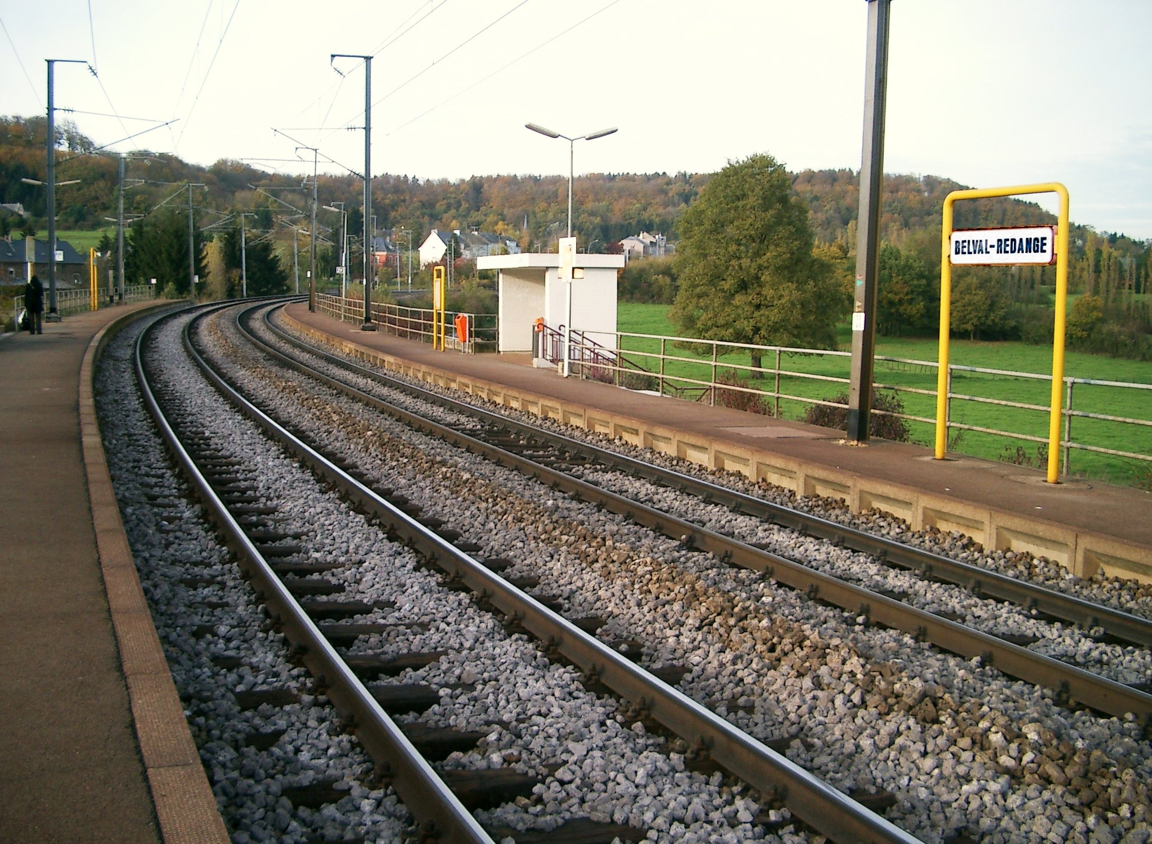 Gare Belval-Réideng